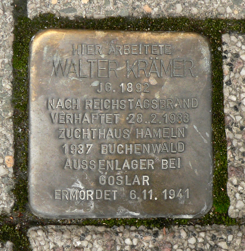 Stolperstein für Walter Krämer, verlegt am 4. Dezember 2012 vor dem Eingang der Buchhandlung Lehmanns an der Heiligerstraße 16; dort hatte sich das Parteibüro der KPD befunden, in dem Krämer als Bezirksleiter tätig gewesen war.